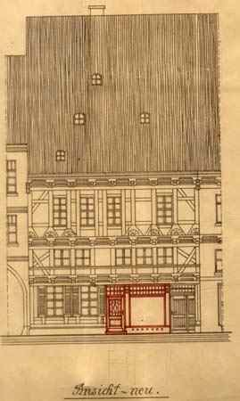 Zeichnung des Hauses Breite Straße 41 in Quedlinburg mit einem geplannten Umbau